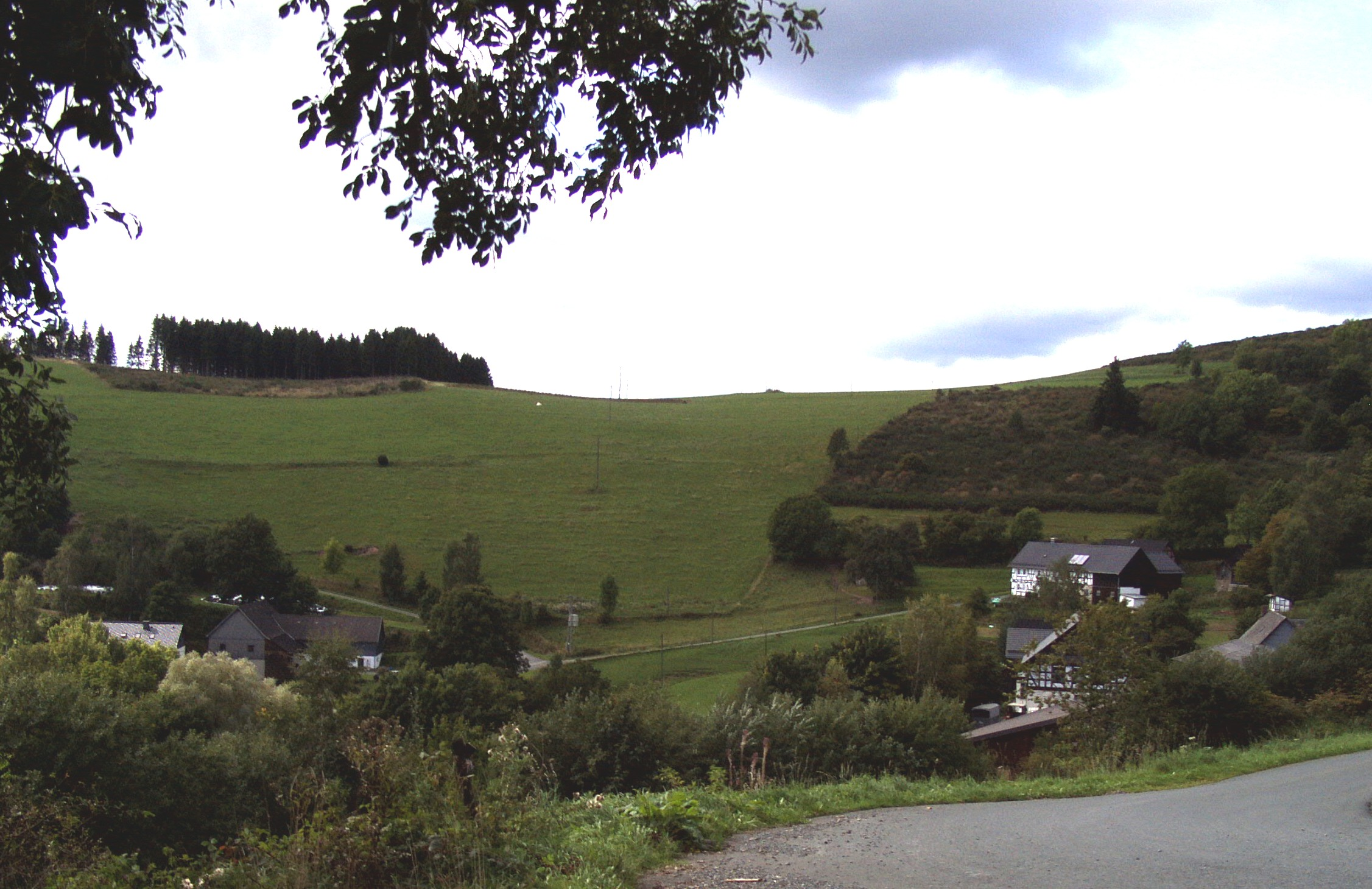 Garsbach